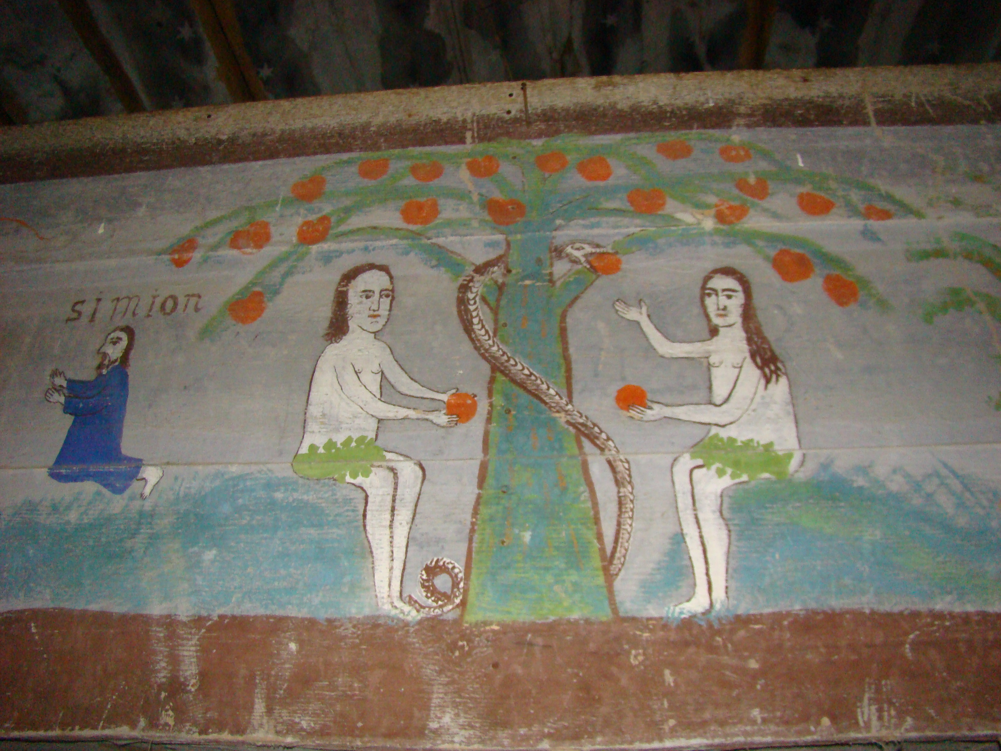 Biserica de lemn "Sfinții Împăraţi" din Aspra